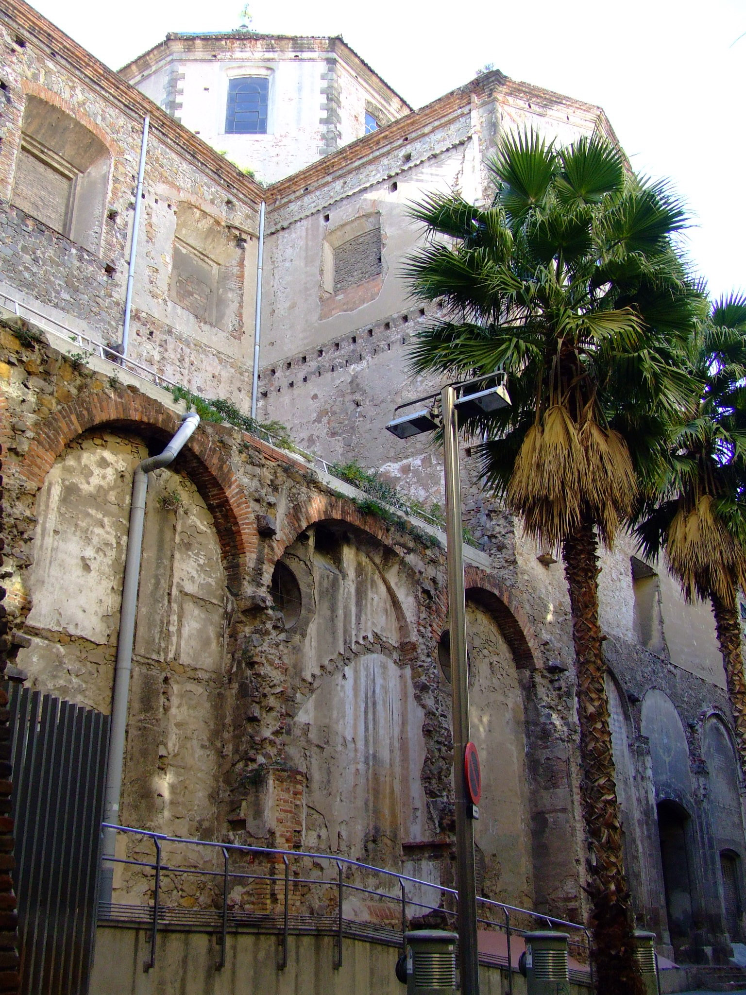 north facade of Iglesia de Sant Agustí, Carrer Hospital, Barcelona